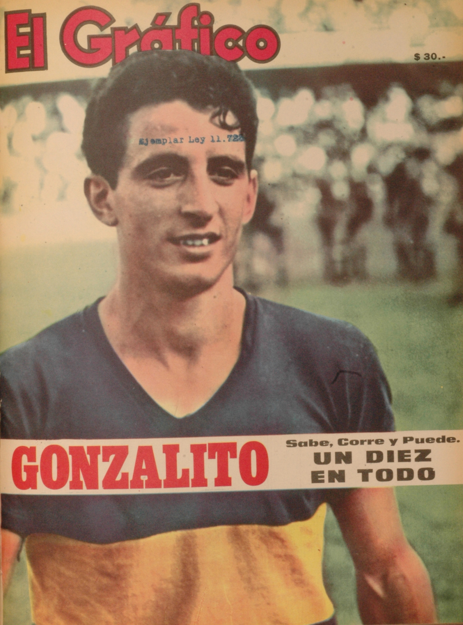 El Grafico del 09 de Noviembre de 1965. Edicion 2405